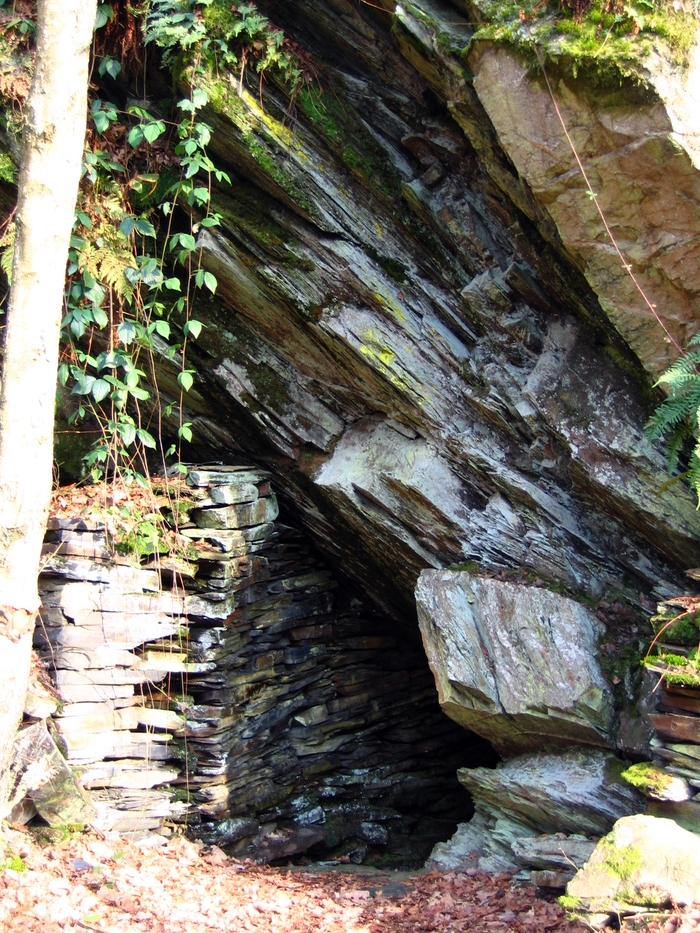 ancienne entrée d'ardoisière à Haybes (Ardennes)